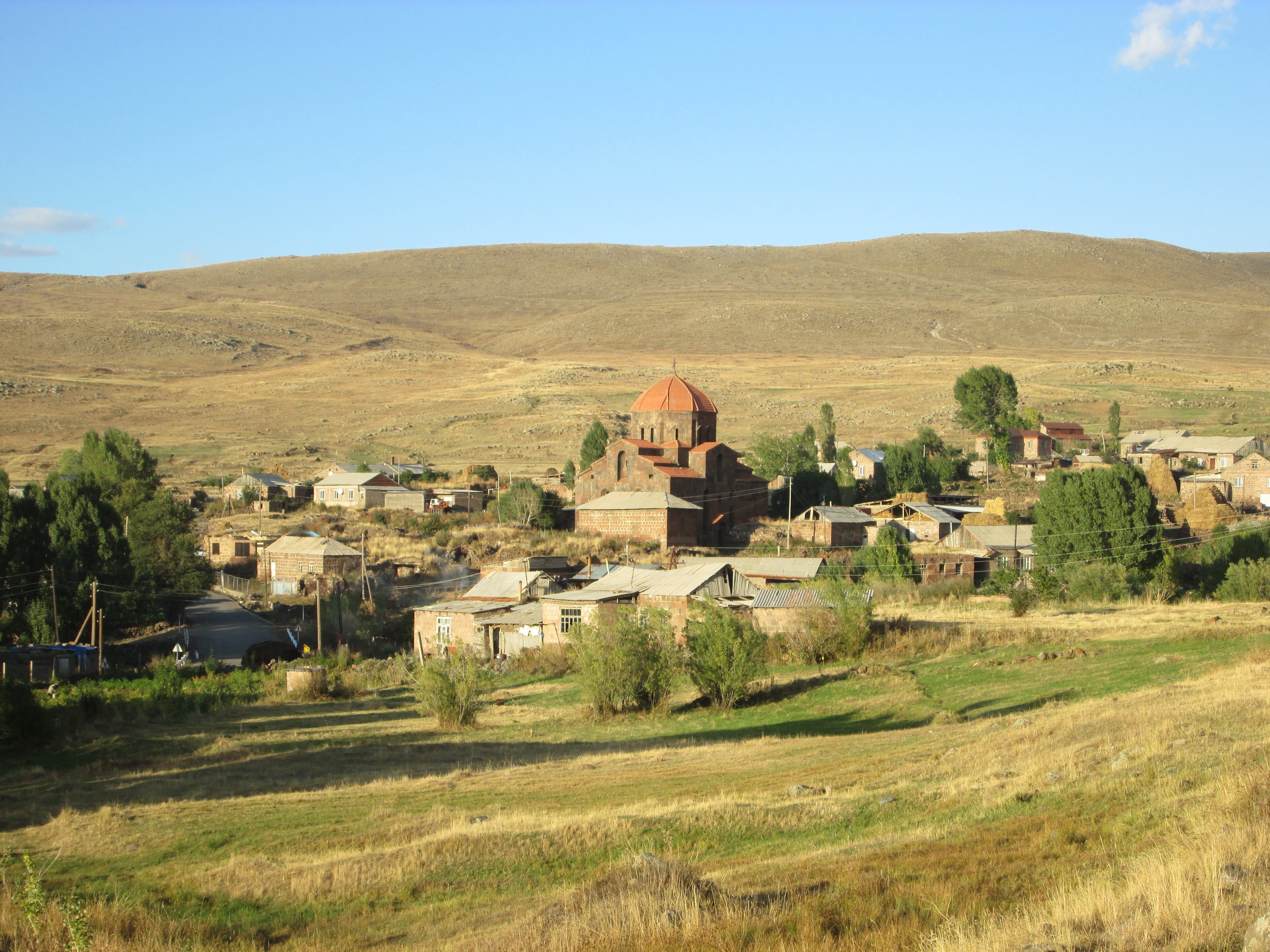 Ս. Գևորգ եկեղիցի, Գառնահովիտ, 7-րդ դար 29/8